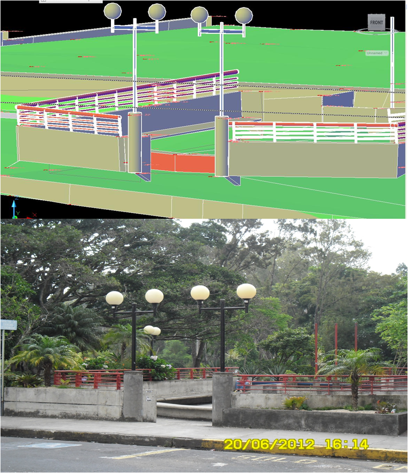 Modelo tridimensional de una de las fachadas de la facultad de la facultad de Ciencias Económicas de la Universidad de Costa Rica, realizado con estación total por los estudiantes de Ingeniería Topográfica.